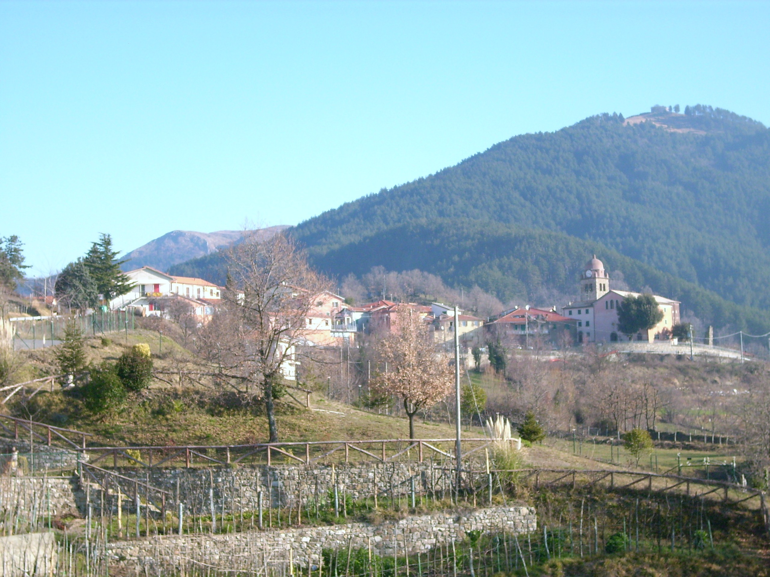 Panorama di Zignago, Liguria, Italy